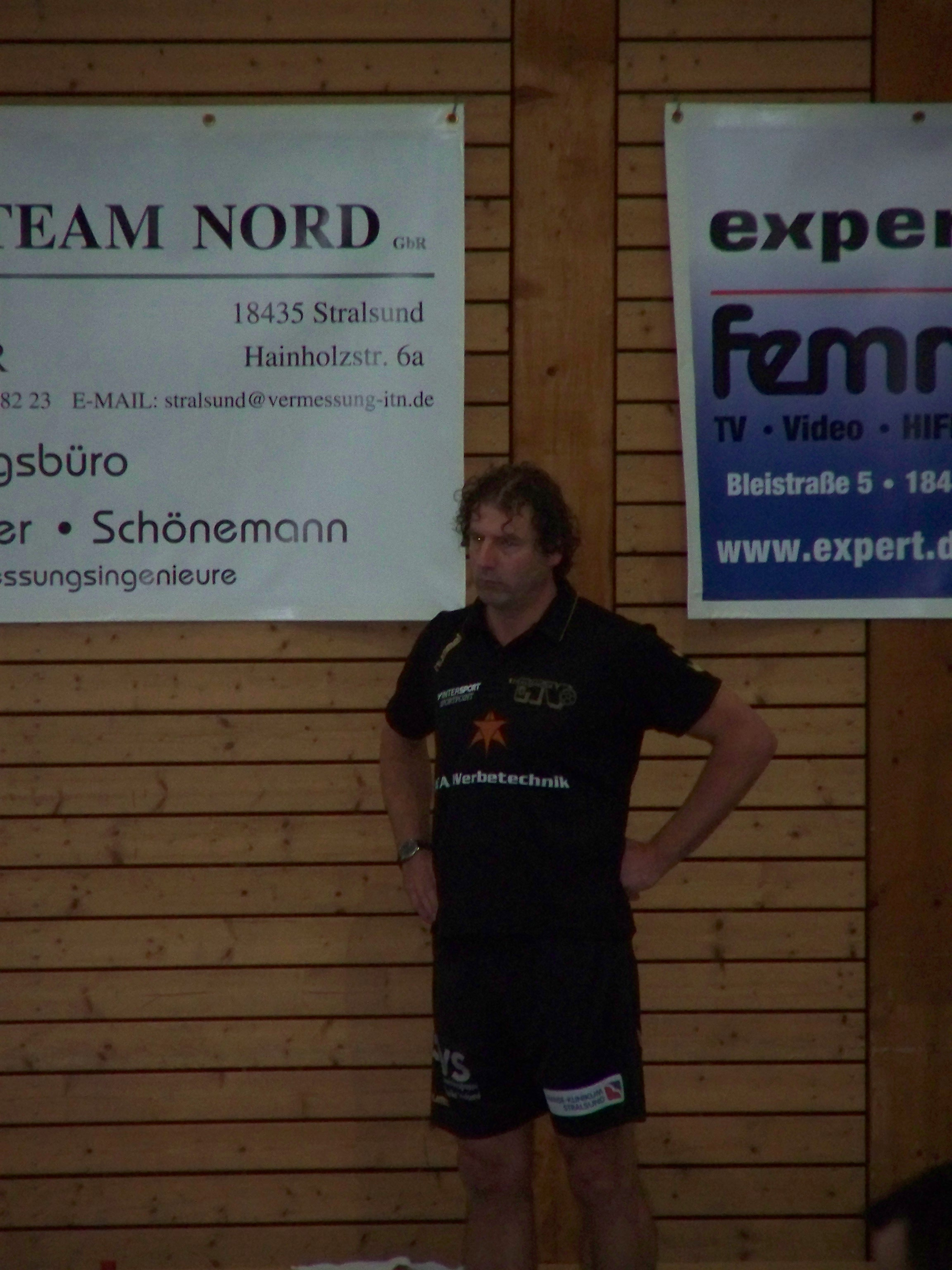 Michael Philippen vom Stralsunder am 26.09.2009 beim Oberliga-Spiel gegen den SV Bankow-Leezen in der Stralsunder Diesterweghalle.